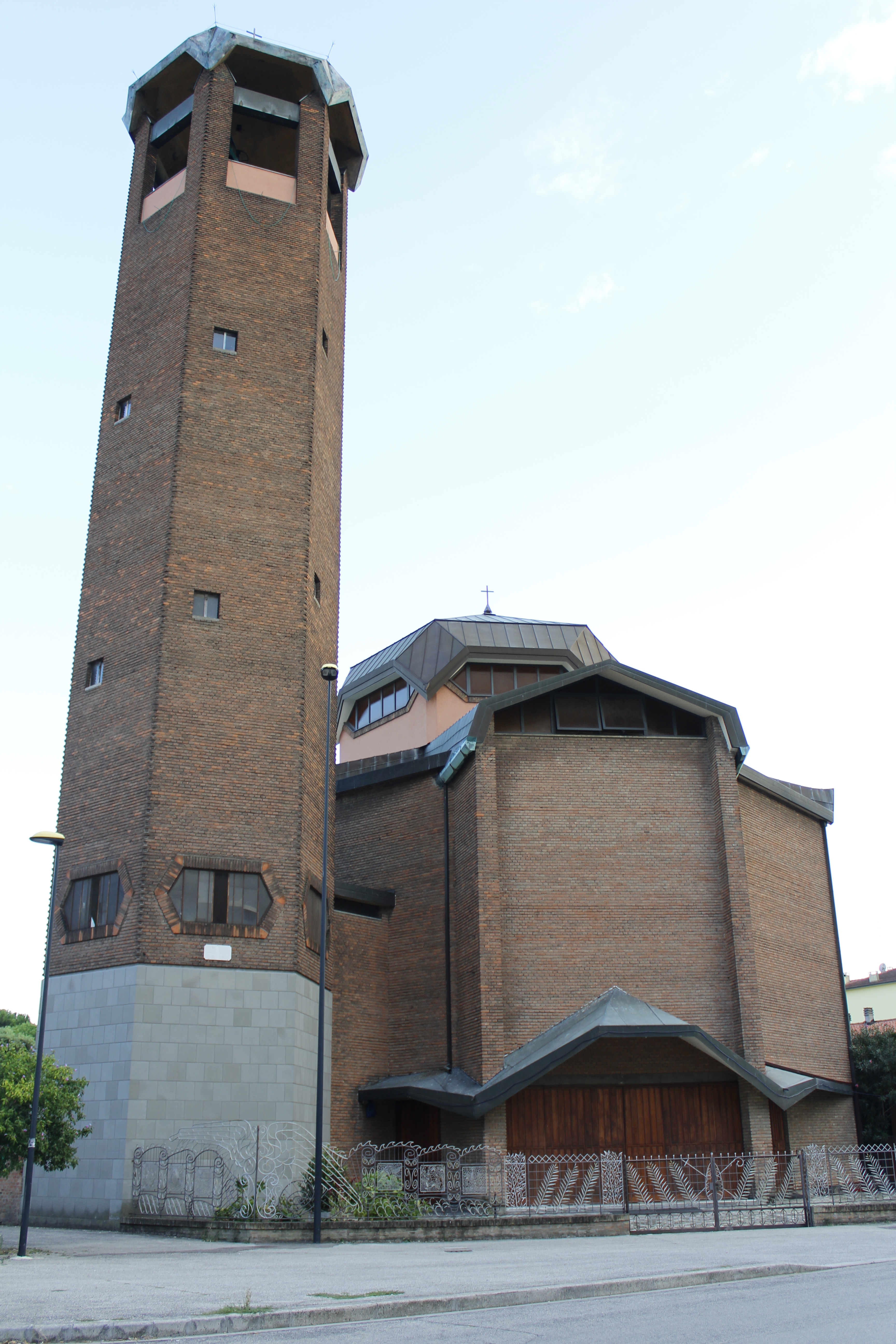 Chiesa di San Pier Damiano, Ravenna